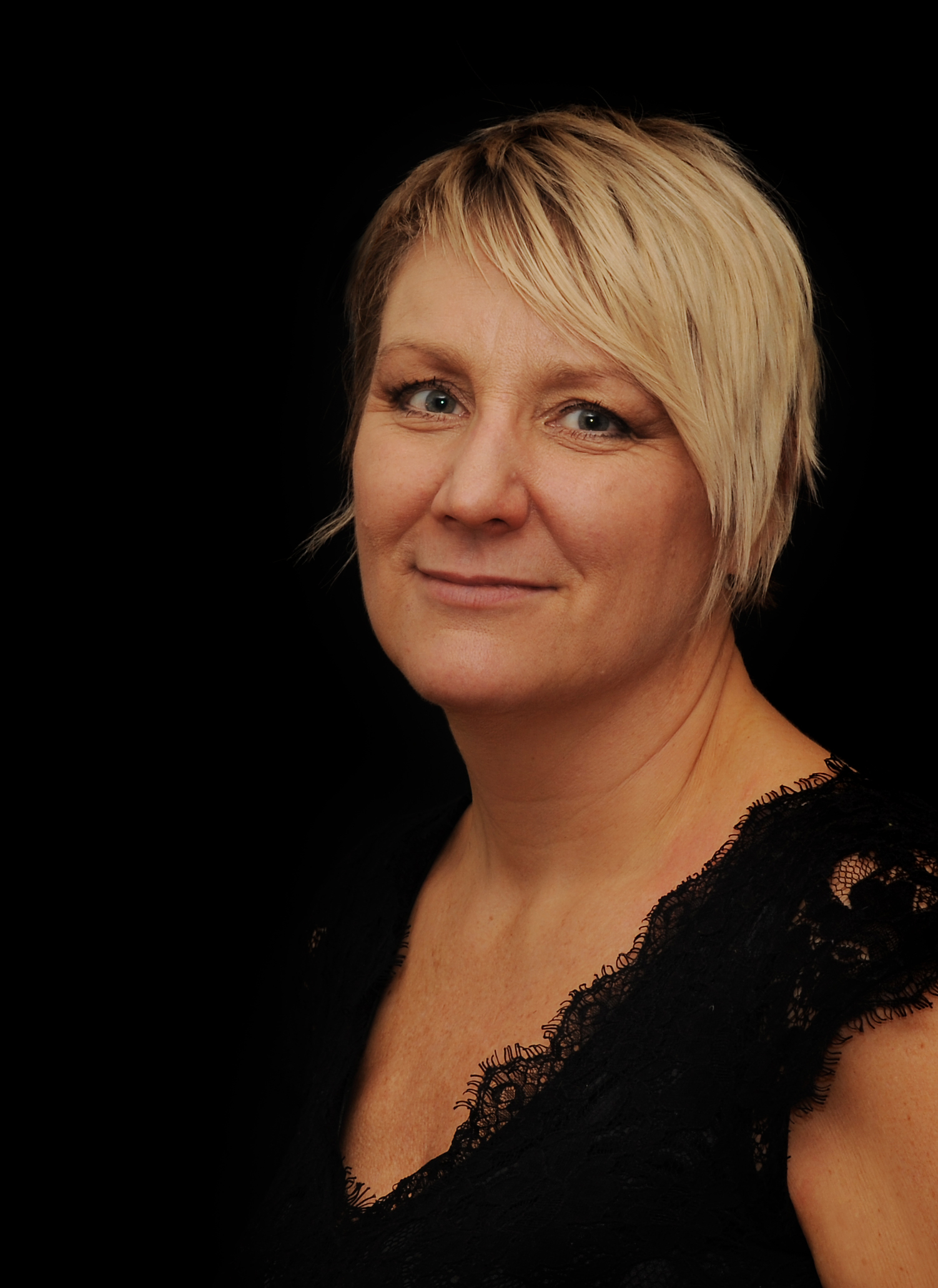 Författare Susan Casserfelt